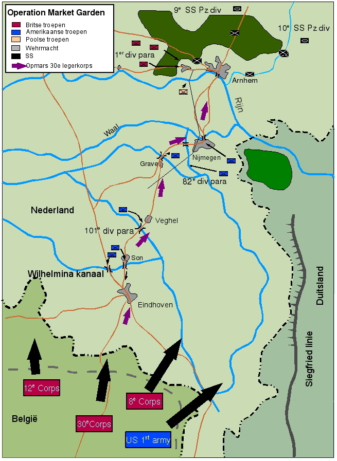 Kaart van de Operatie Market Garden, ook wel bekend als de Slag om Arnhem.